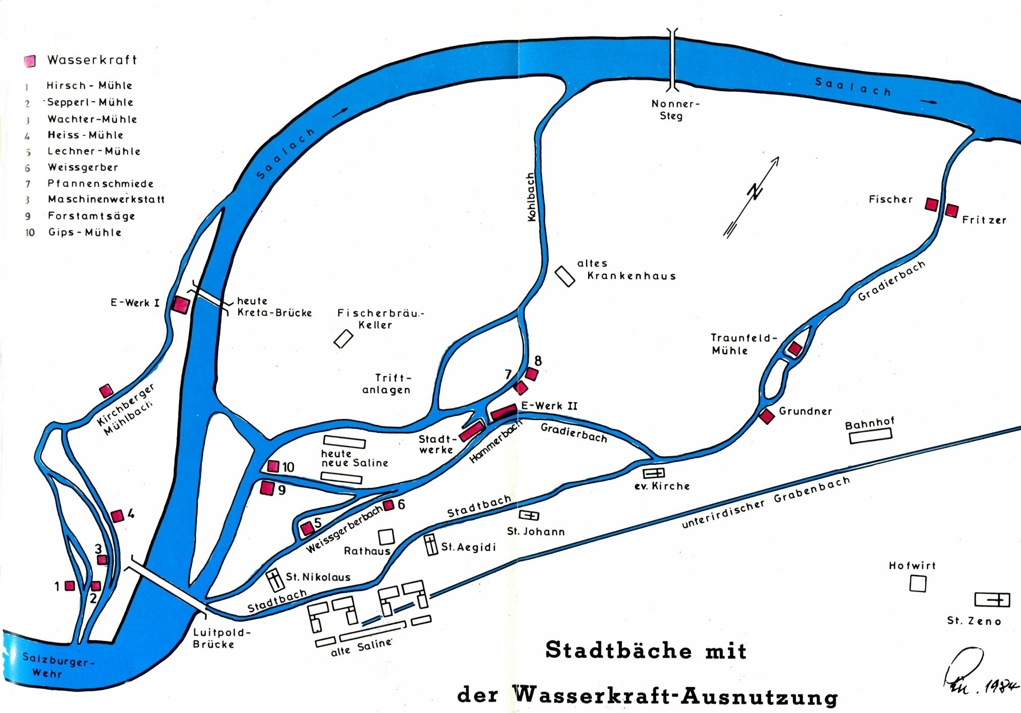 Stadtplan von Bad Reichenhall mit dem Verlauf der Stadtbäche um 1900